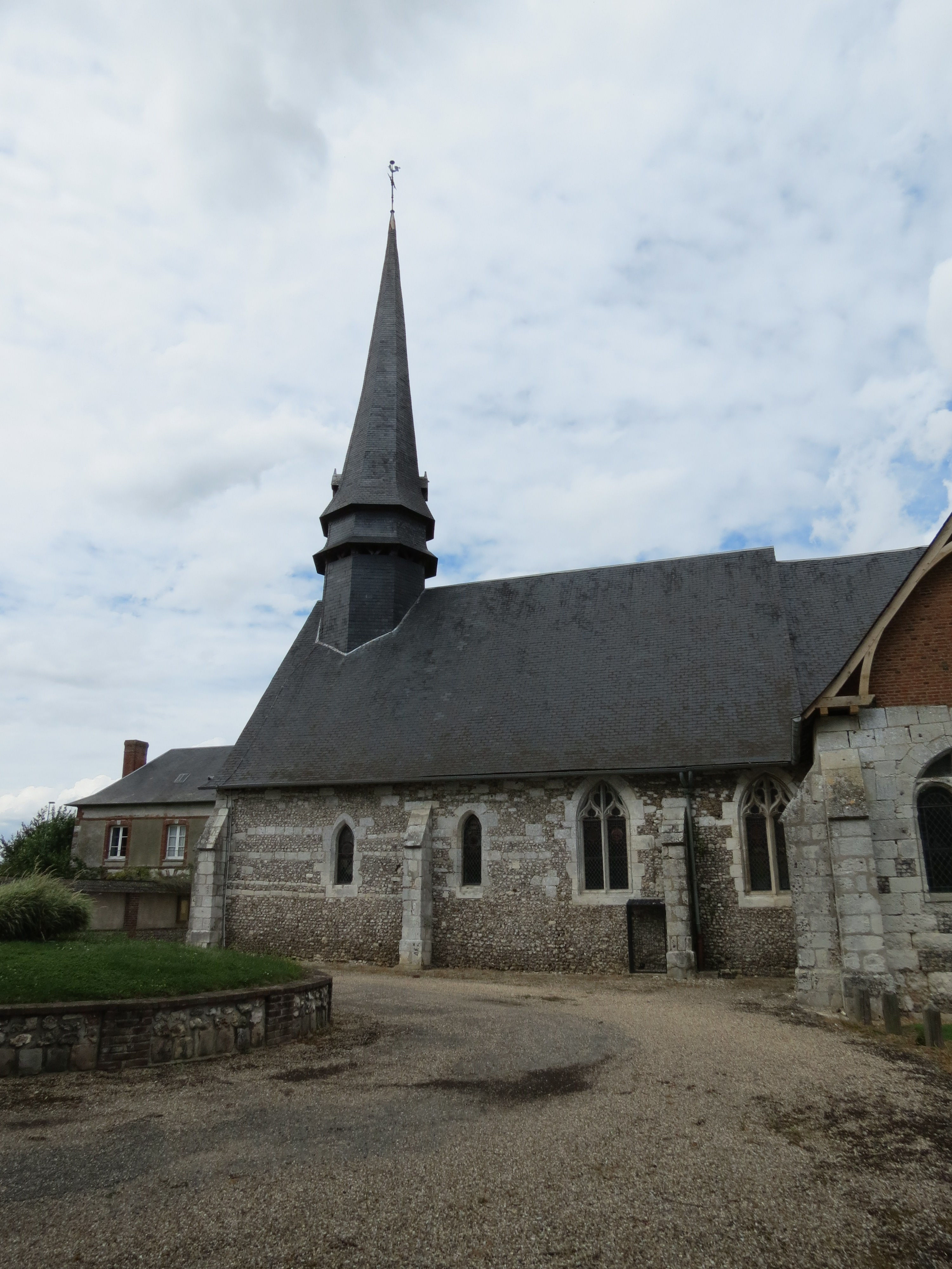 Eglise Notre-Dame.